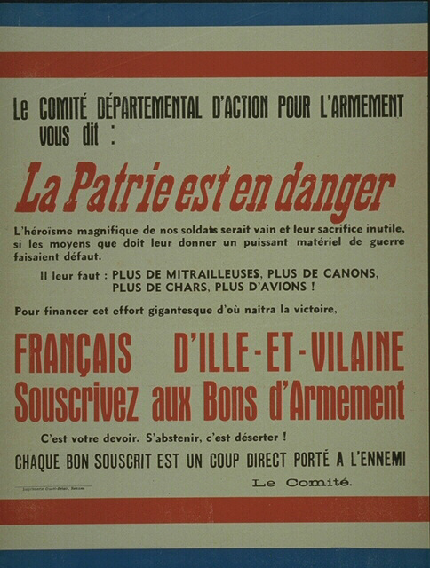 Date : 1939 Création : Comité Départemental pour l'Armement - Ille-et-Vilaine Bordée en haut et en bas des couleurs nationales, l'affiche exhorte les Français d'Ille-et-Vilaine à souscrire aux bons d'armement, afin de financer l'armement de la Patrie.